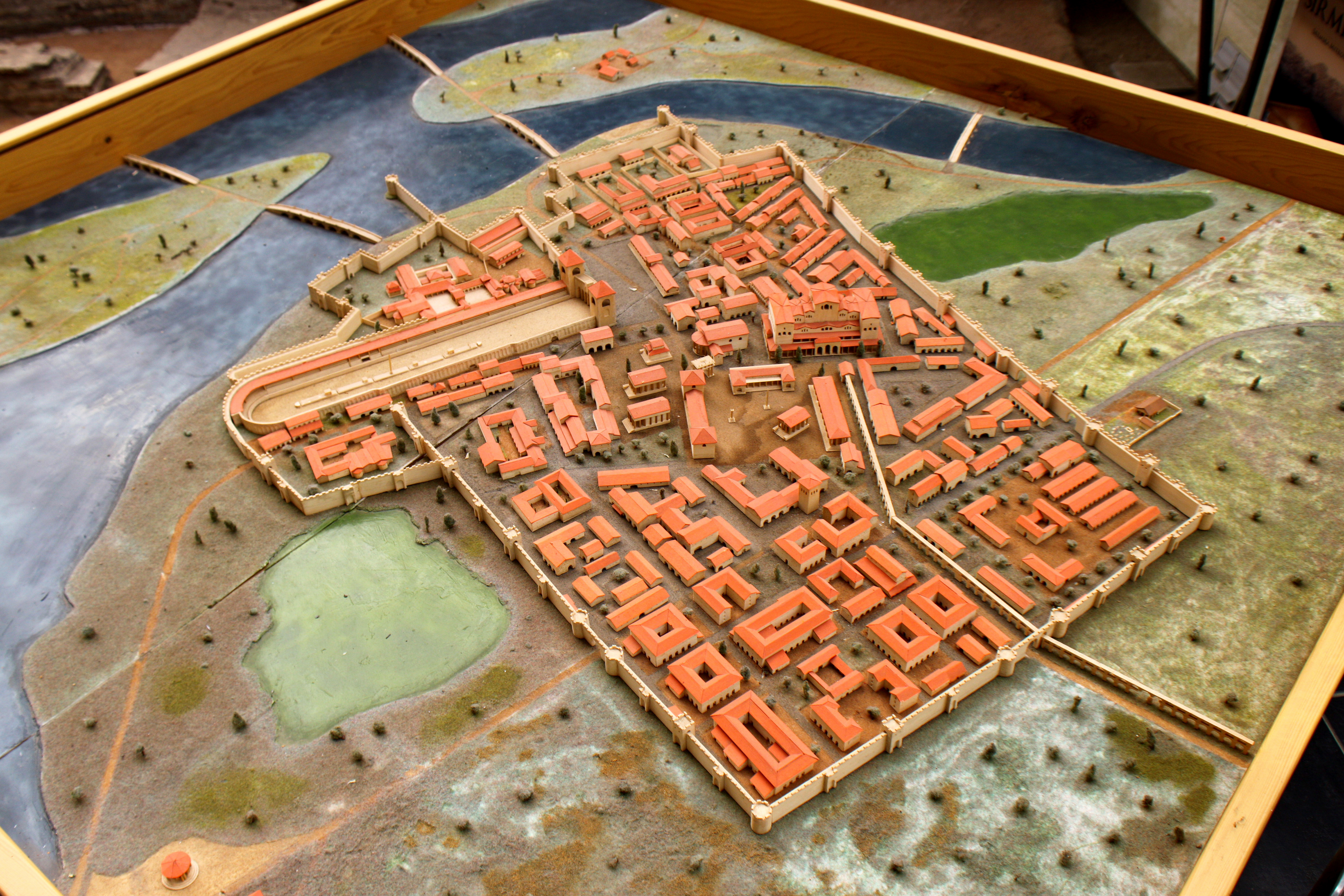 Српски (ћирилица): Макета Сирмијума, Сремска Митровица, Србија.